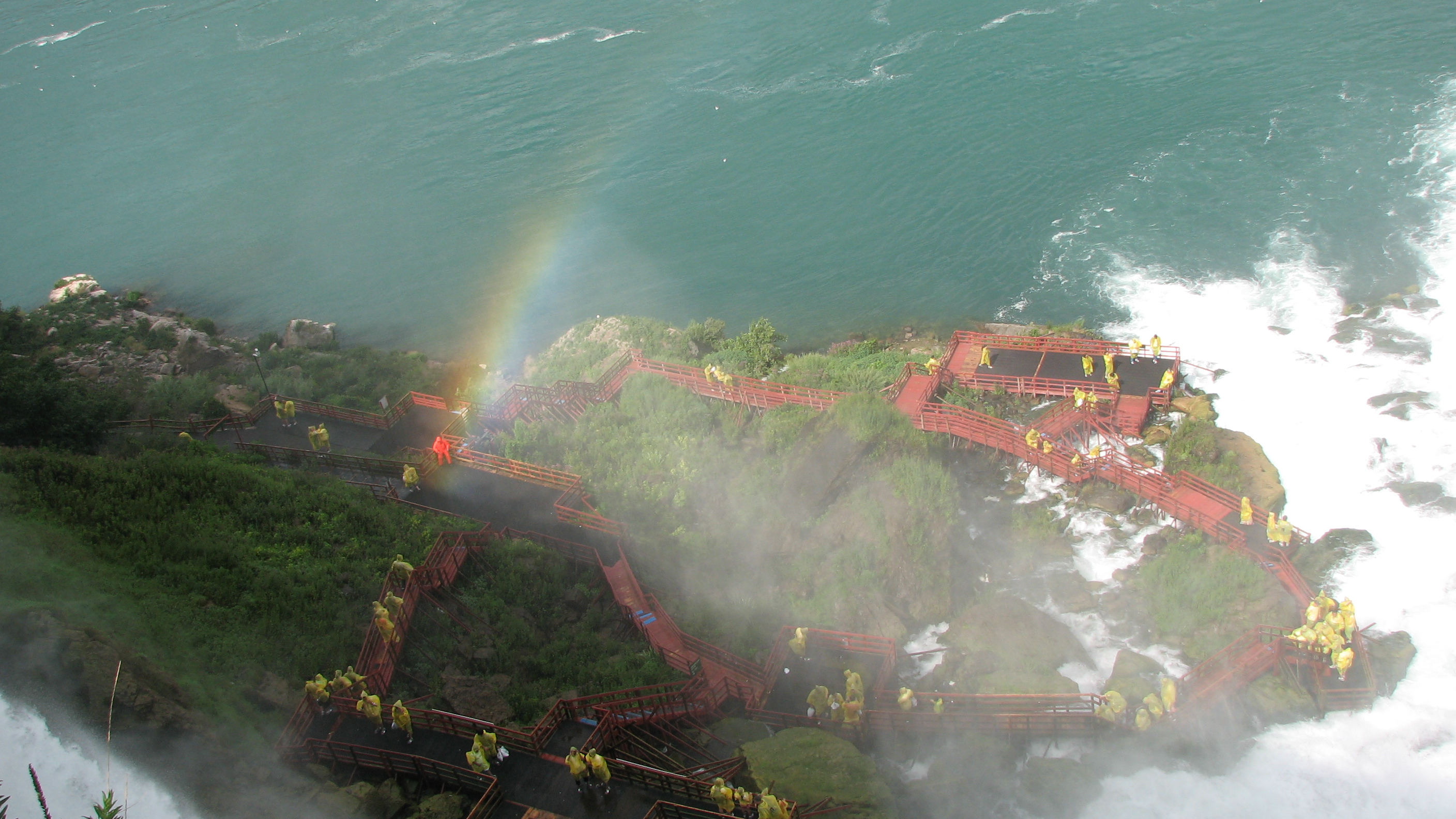 நயாகராவில் அமெரிக்க பகுதியில் அமைந்துள்ள பிரைடல் வெய்ல் அருவியை பார்க்க அமைக்கப்பட்டுள்ள மர படிக்கட்டுக்கள். இதை கேவ் ஆப் த வின்ட்ஸ் ( Cave of the Winds ) என்பார்கள். . --குறும்பன் 02:42, 15 ஜூலை 2008 (UTC)